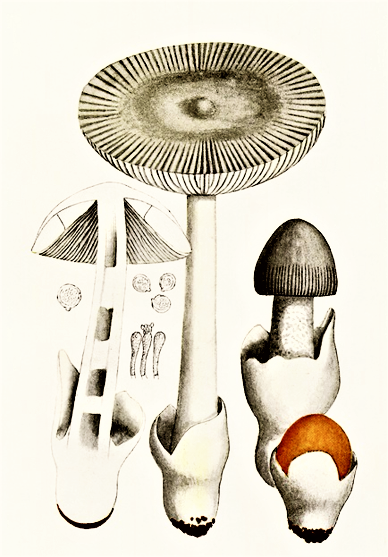 Giacomo Bresadola: Amanita vaginata